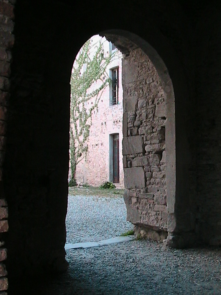 Varano de' Melegari - Castello Pallavicino